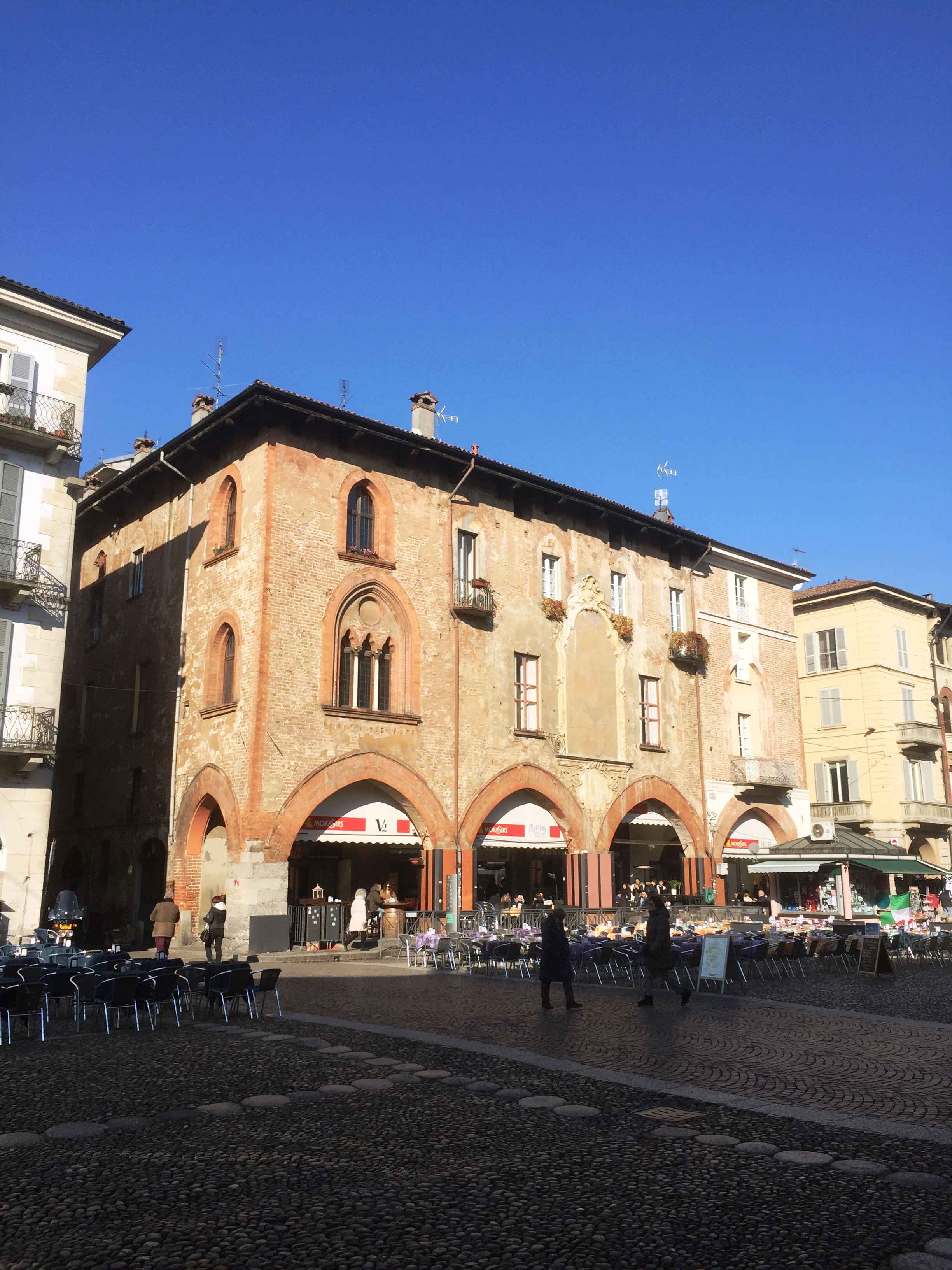 Casa Rossa